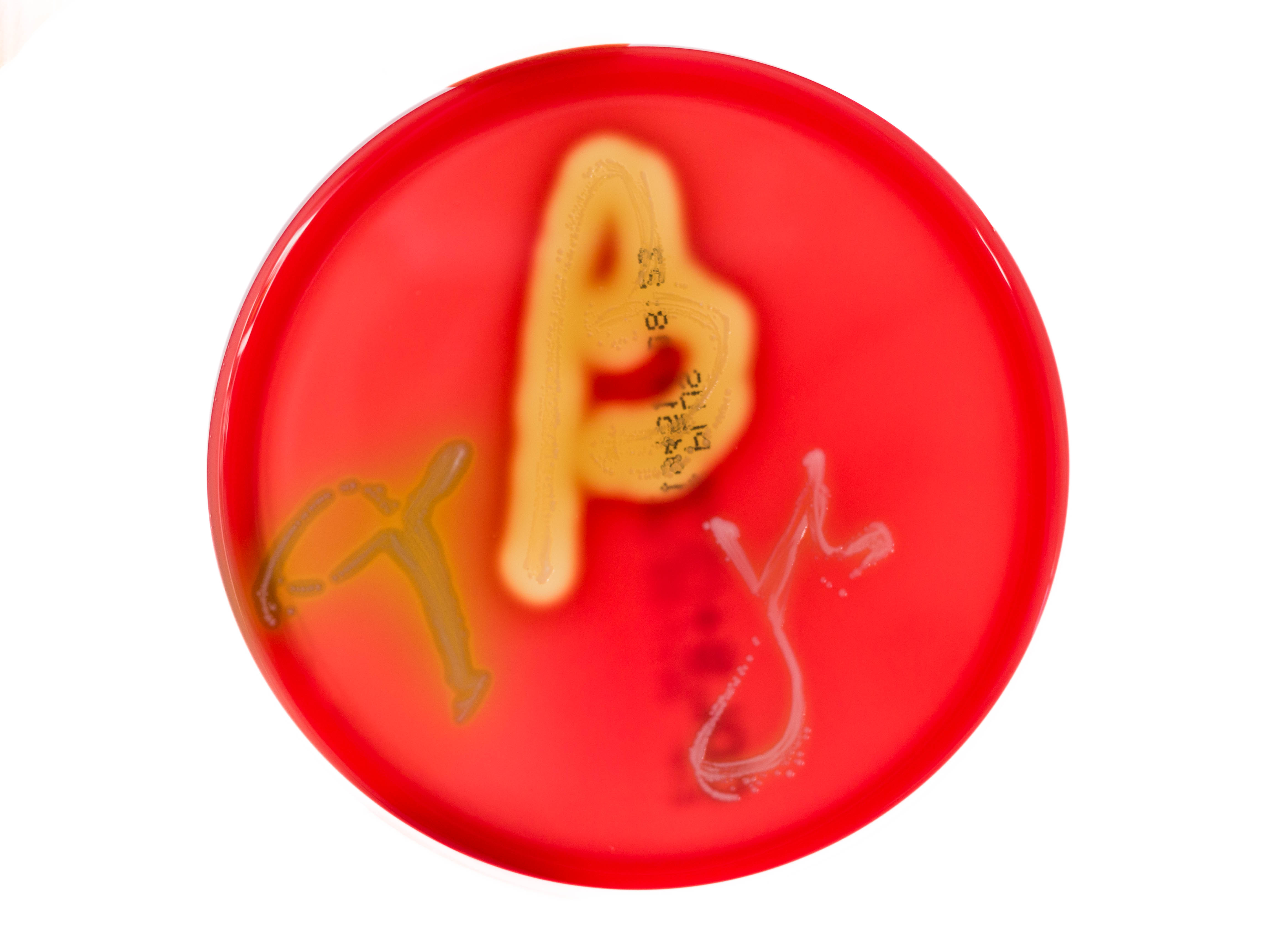 Hemolysis types